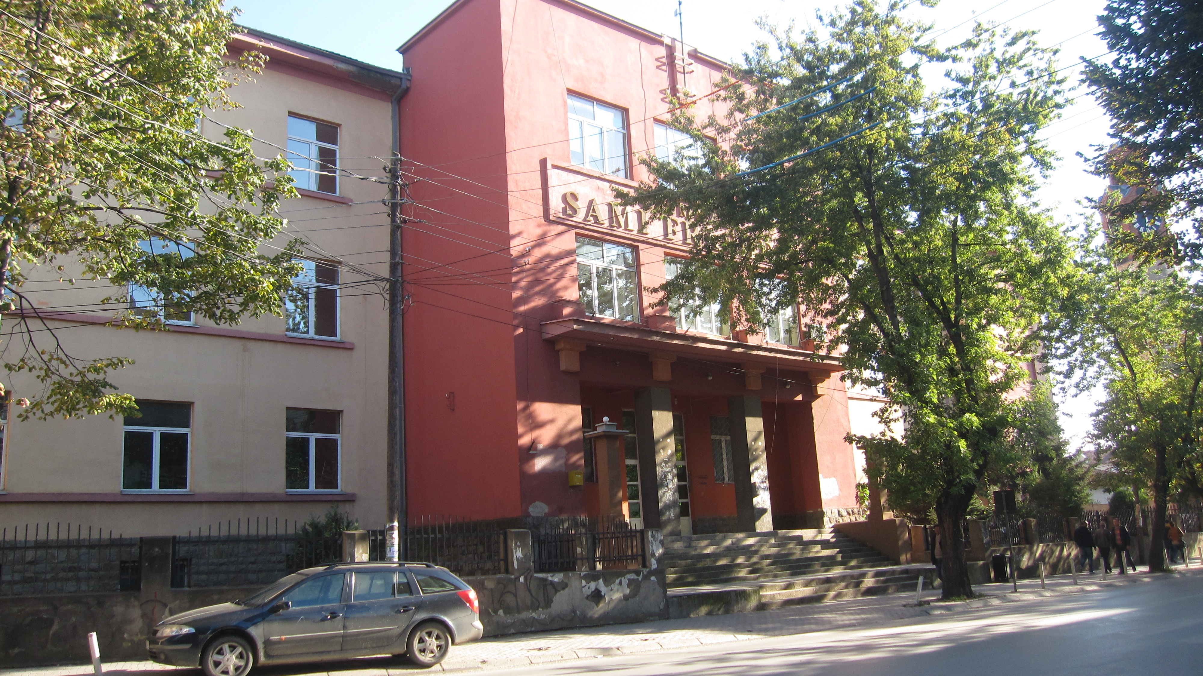 Gjimnazi – Sami Frashëri